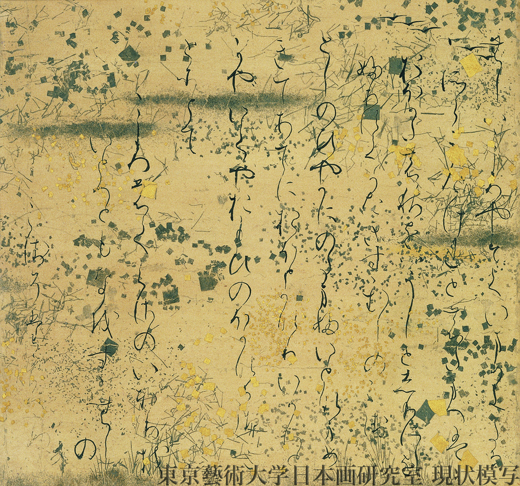 紙本墨色／一面 平安時代後期・12世紀 縦21.8cm 横23.4cm 五島美術館蔵